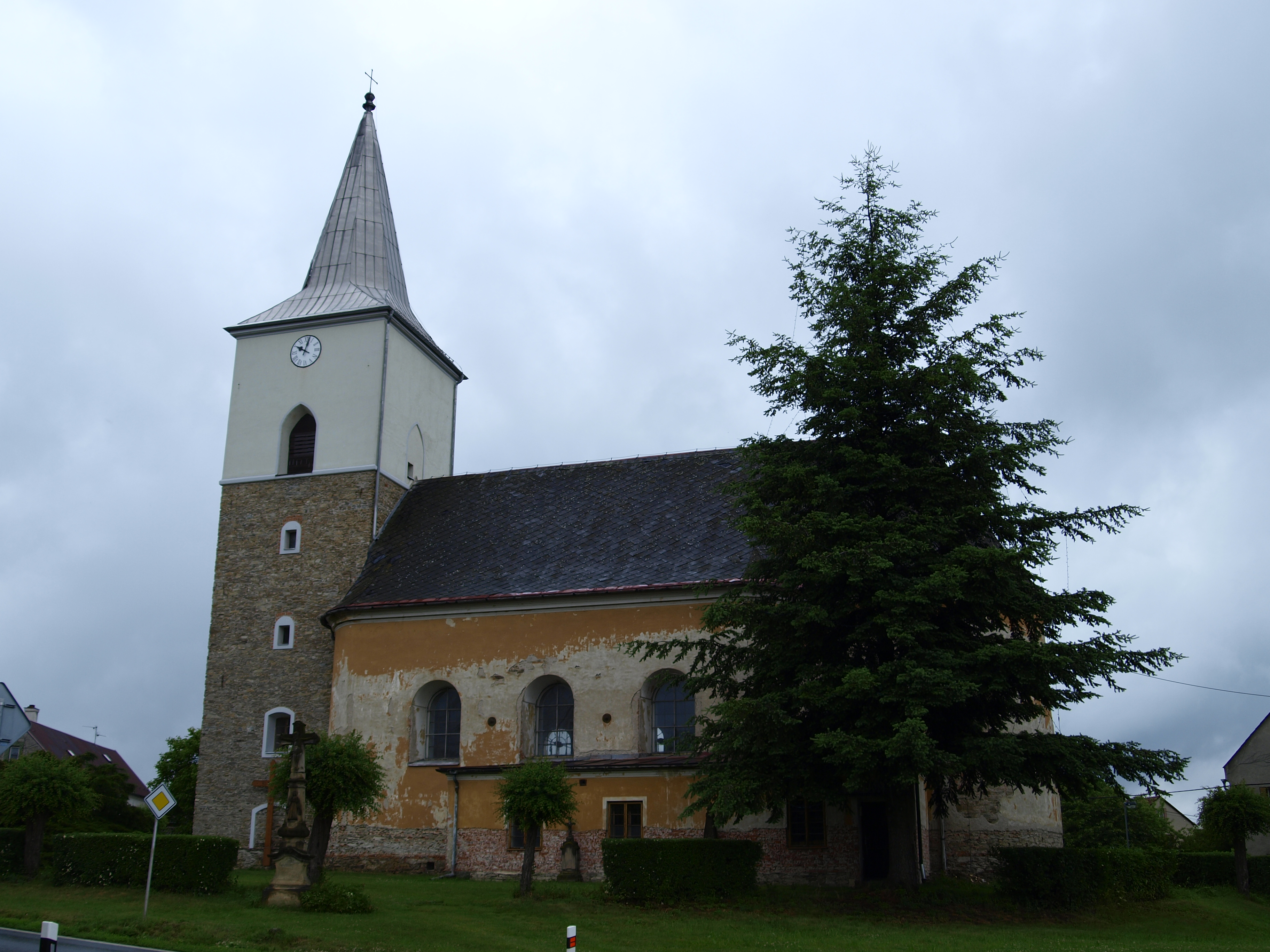 Mladějovice, okres Olomouc, kostel sv. Máří Magdalény od jihovýchodu This file was uploaded during the project of WikiTown Litovel.